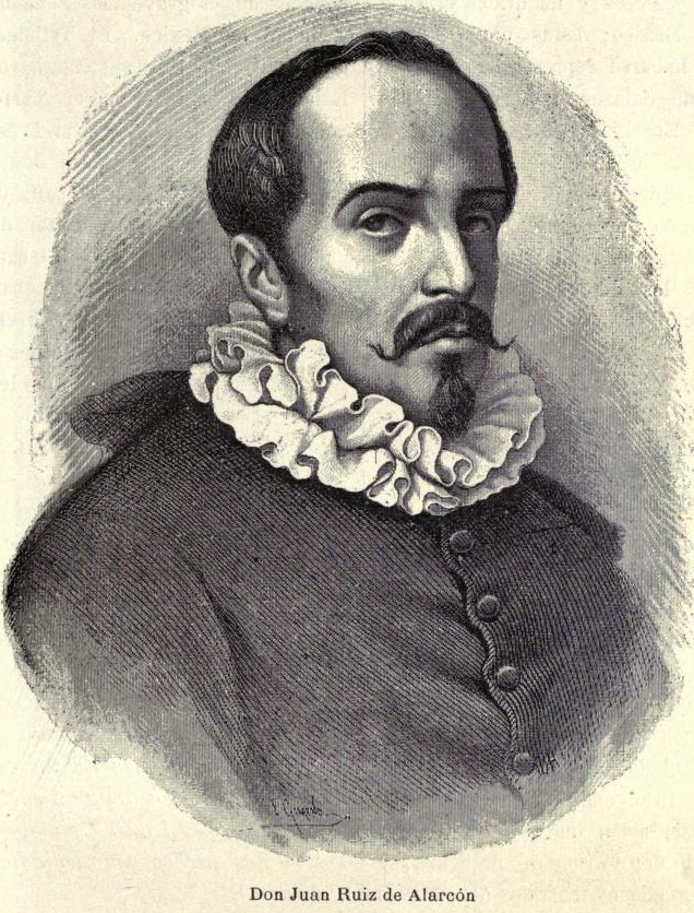 Grabado de Juan Ruiz de Alarcón, por Eduardo Gimeno. Tomado de Riva Palacio, Vicente. México a través de los siglos, t. II. México: Ballescá, 1884, p. 745.